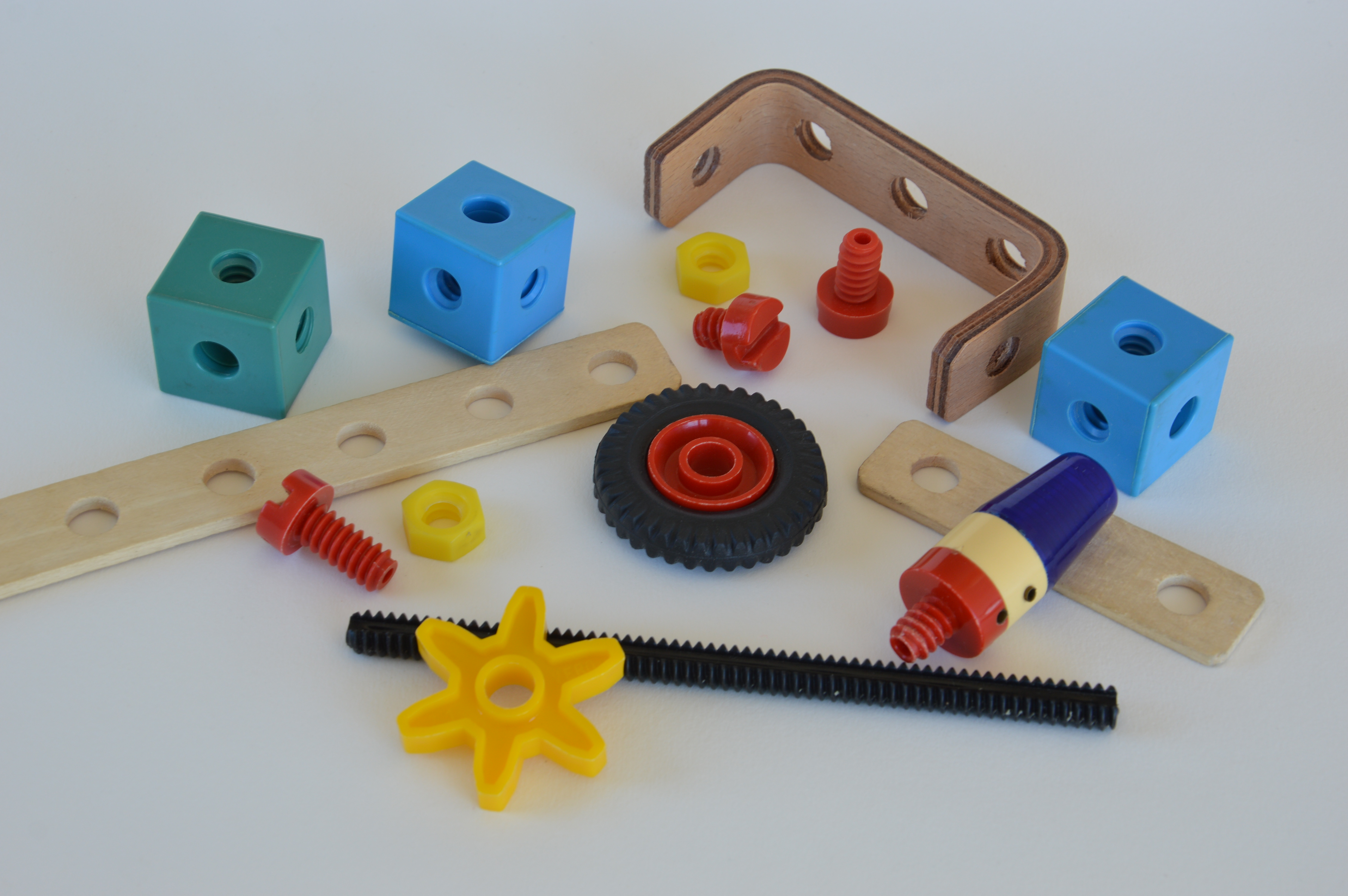 VERO Construc, Baukasten-System aus der DDR. diverse Bauelemente: Lochleisten, Würfel, Schrauben, Muttern, Geweindestab, Rad, Zahnrad, Leuchte